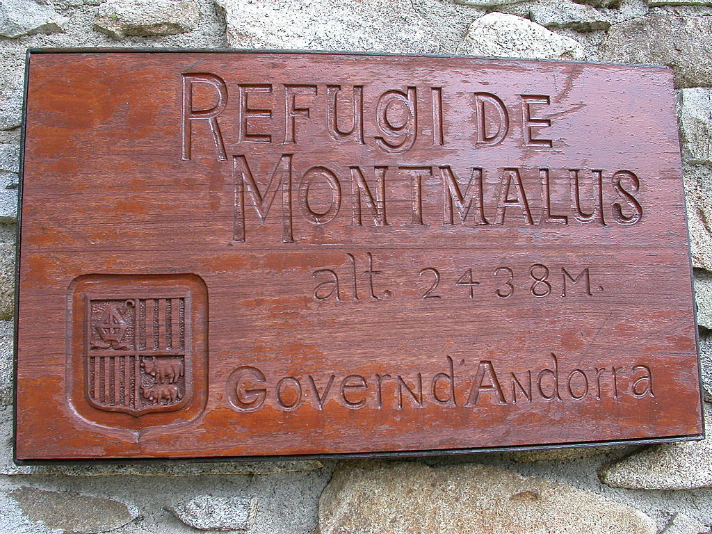 Refuges Andorre